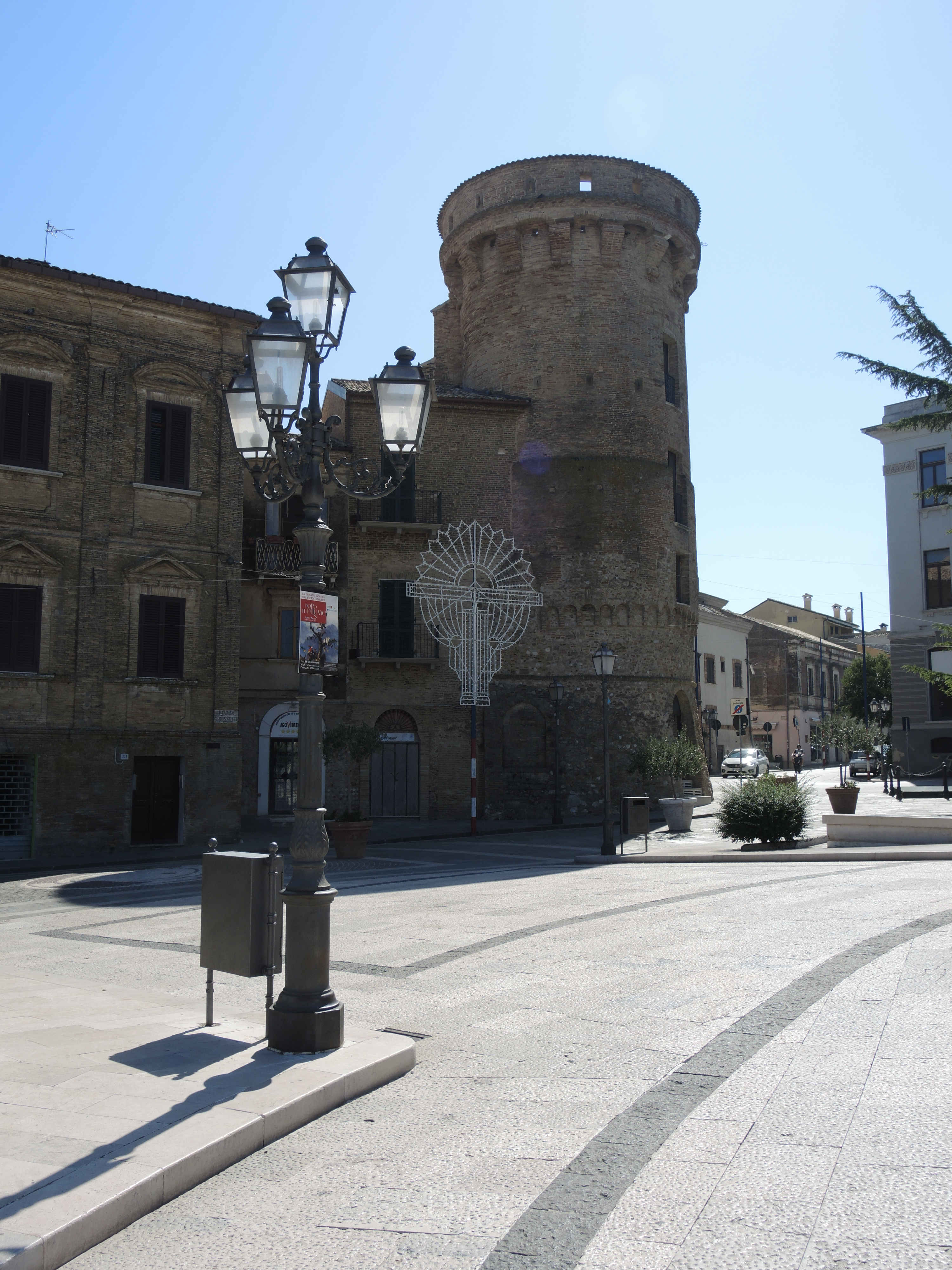 Torre Bassano This is a photo of a monument which is part of cultural heritage of Italy.